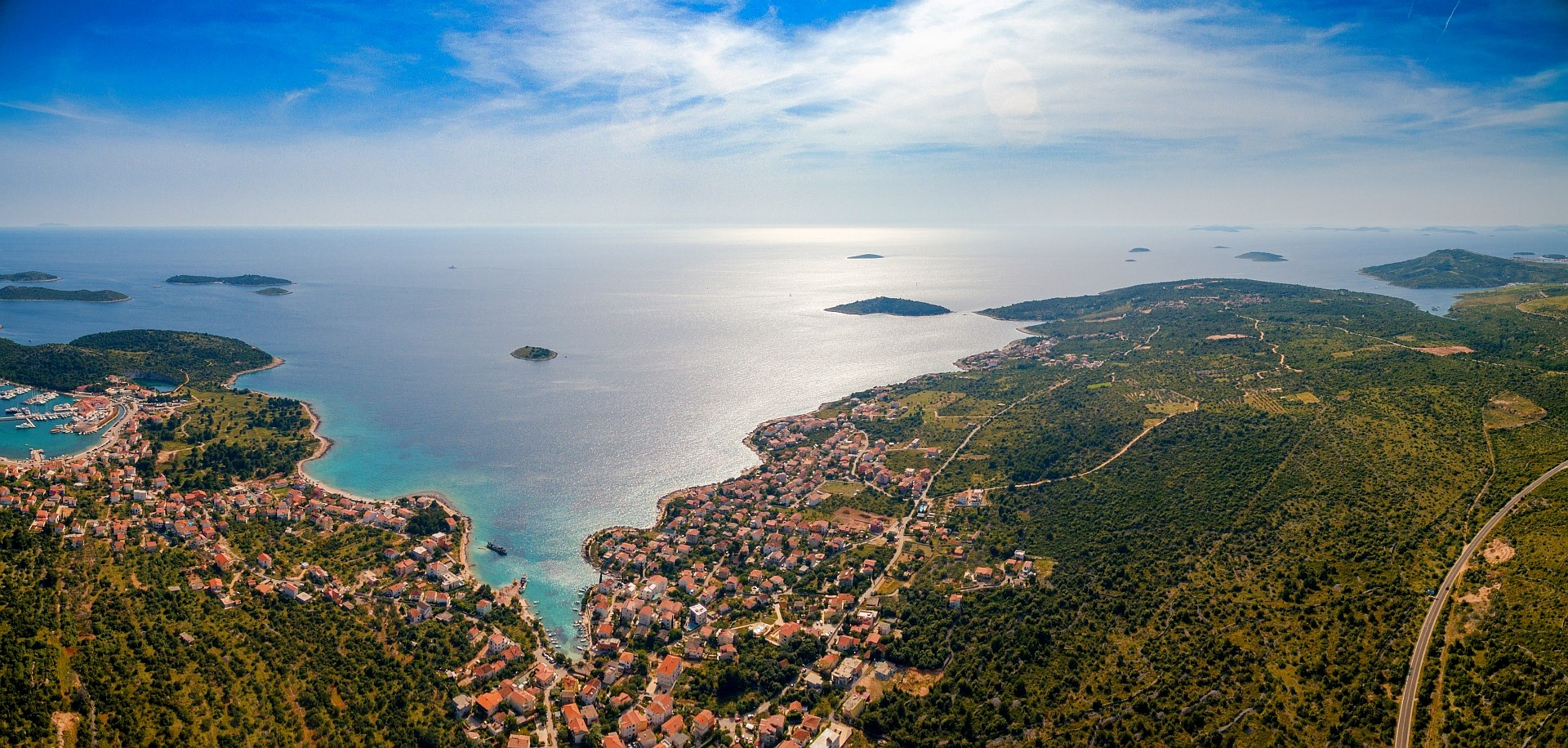 ZEČEVO ROGOZNIČKO-naselje